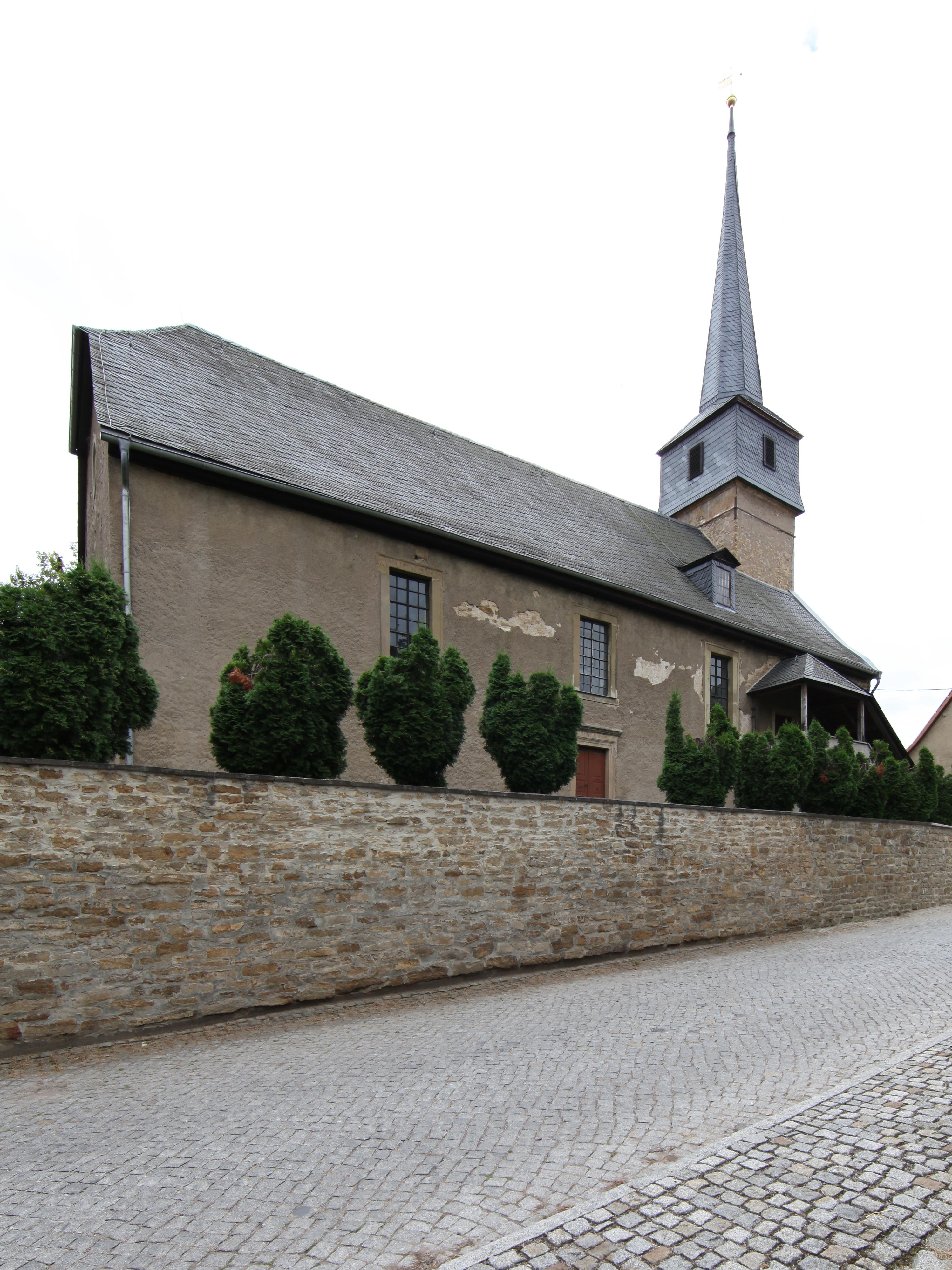 Evangelische Kirche St. Mauritius in Krautheim im Landkreis Weimarer Land, Thüringen